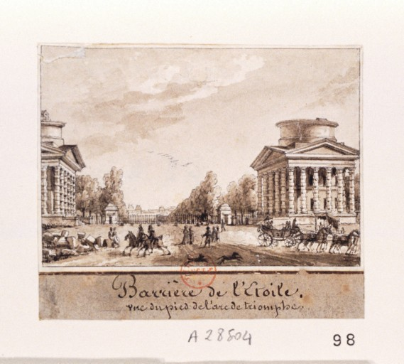 La barrière de l'Étoile vue du pied de l'Arc de Triomphe, par Christophe Civeton (1796-1831)